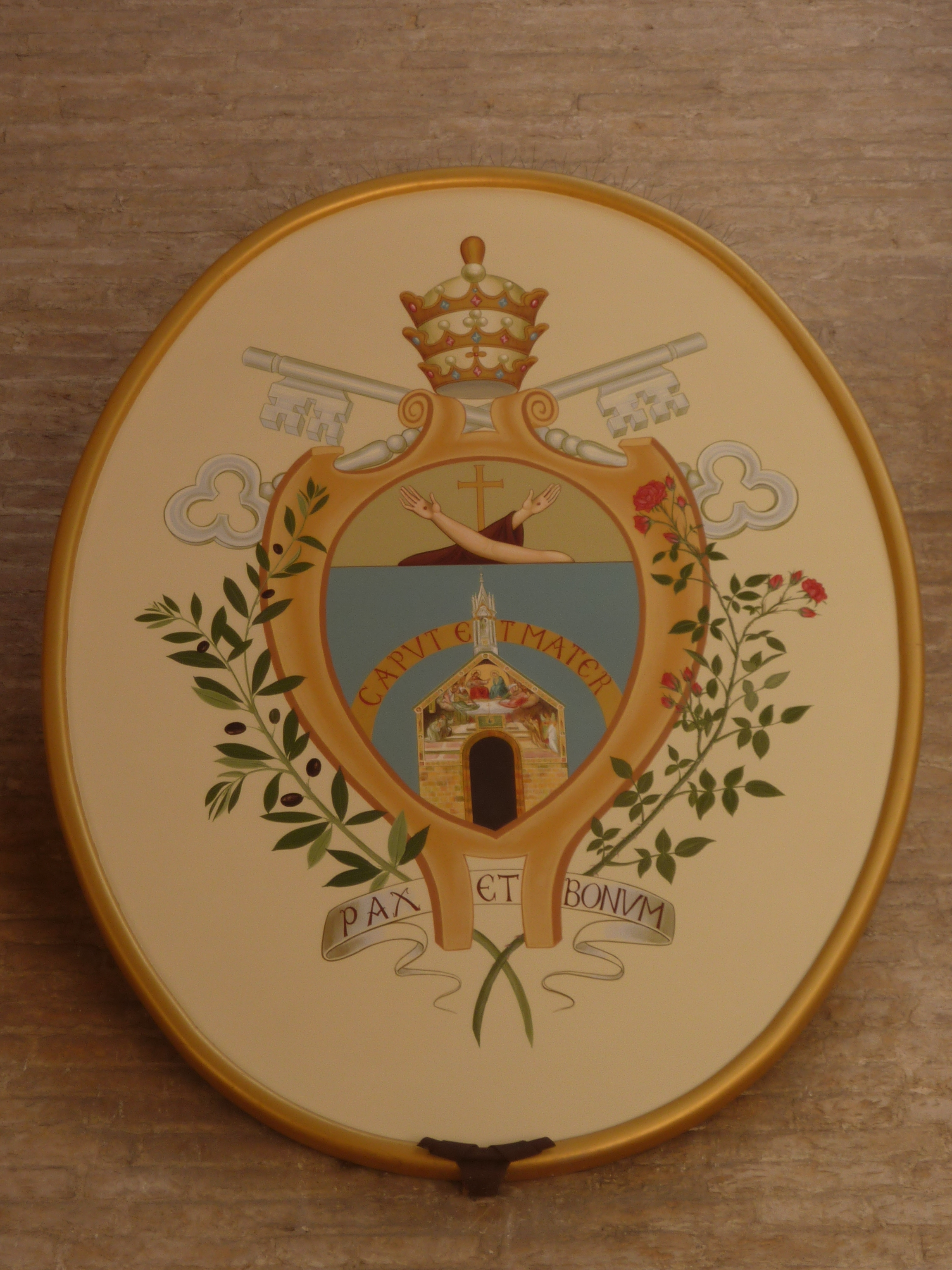 Basilique Sainte-Marie-des-Anges (Assise), Armes